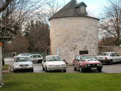 Wehrturm aus 1380 in Purgstall an der Erlauf Niederösterreich